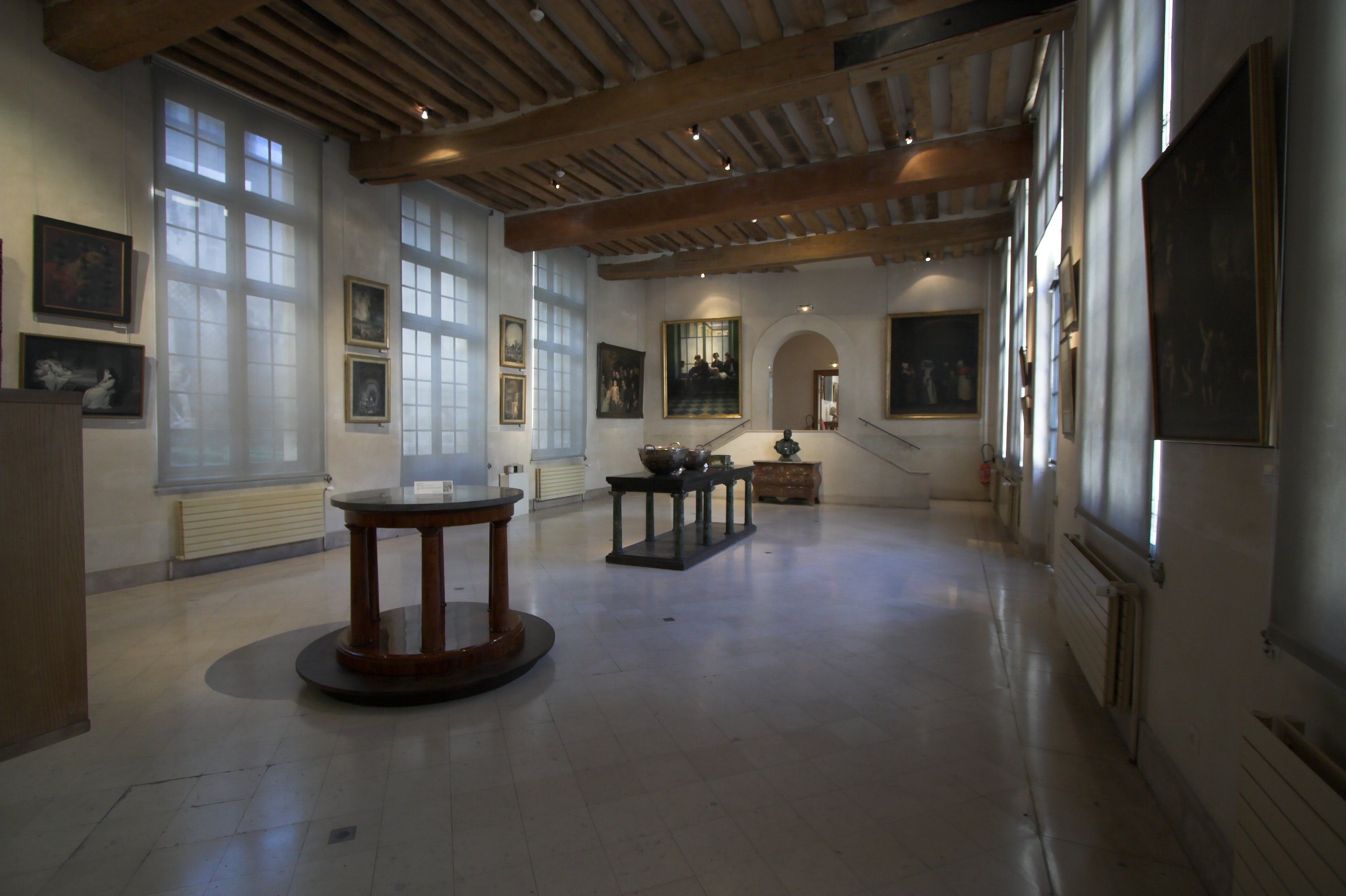 Musée de l'Assistance Publique-Hopitaux de Paris / Hôtel de Miramion(Paris, France)